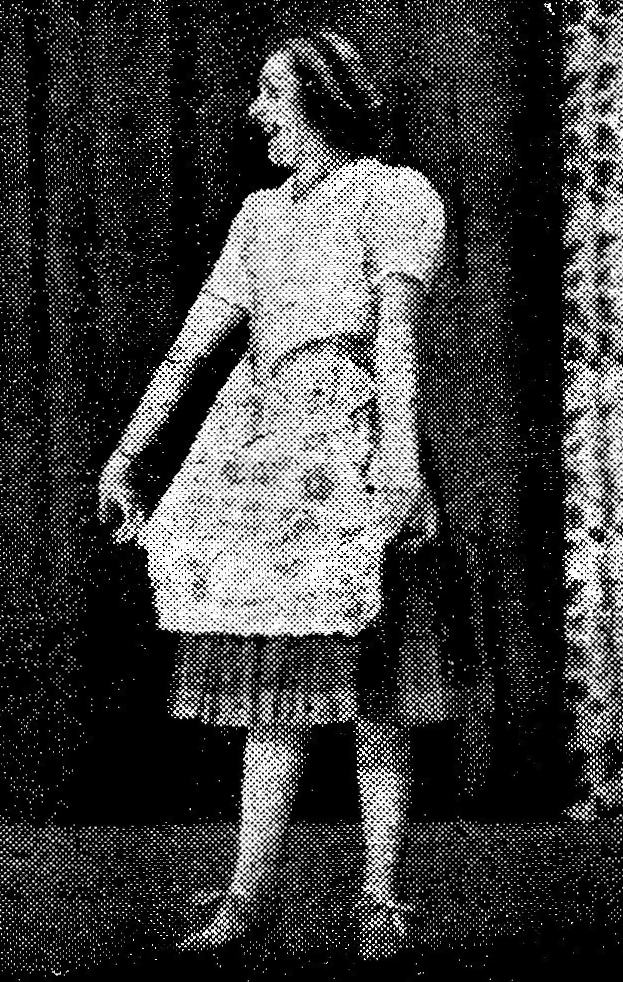 Mitzi Tesar (* 1912, † nach 1983)